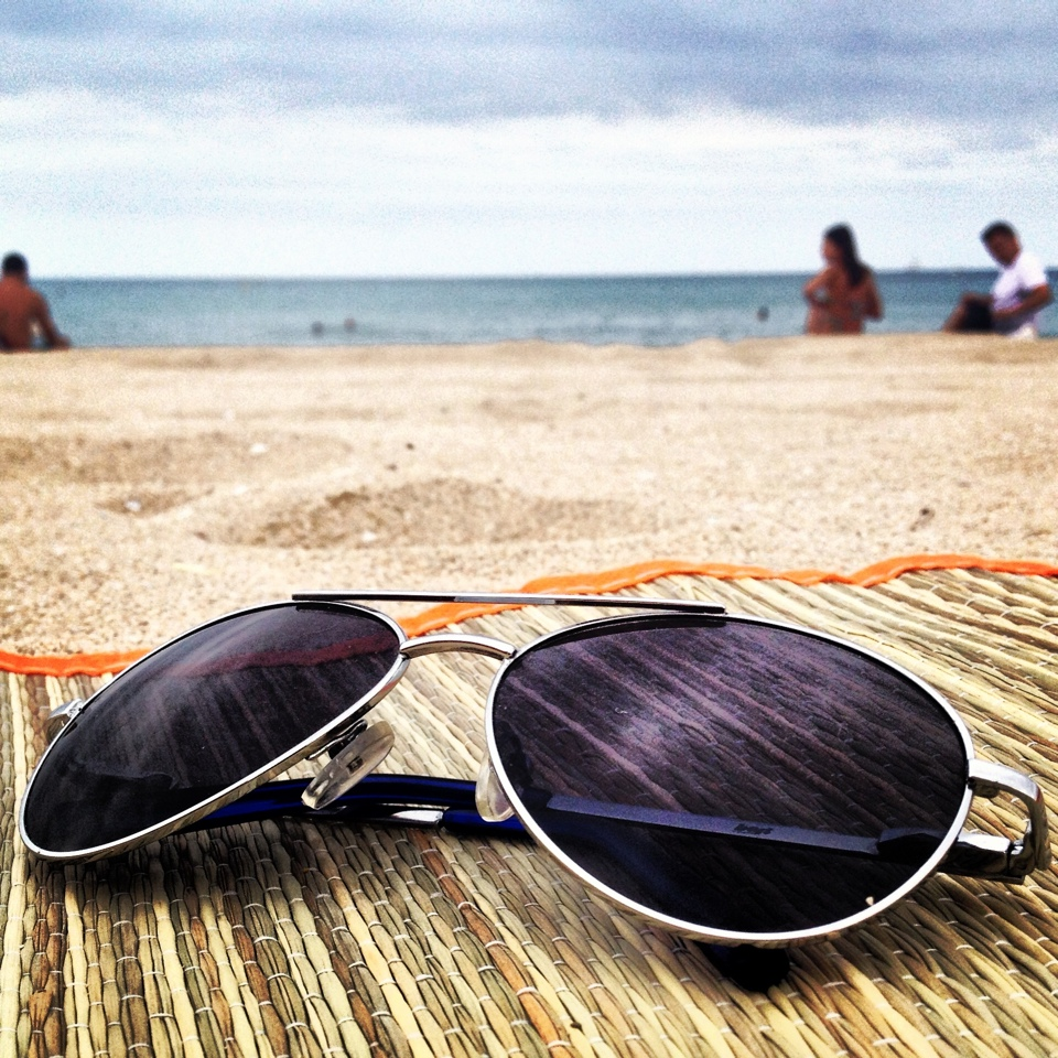 Солнечные очки (фотография, обработанная в Instagram)